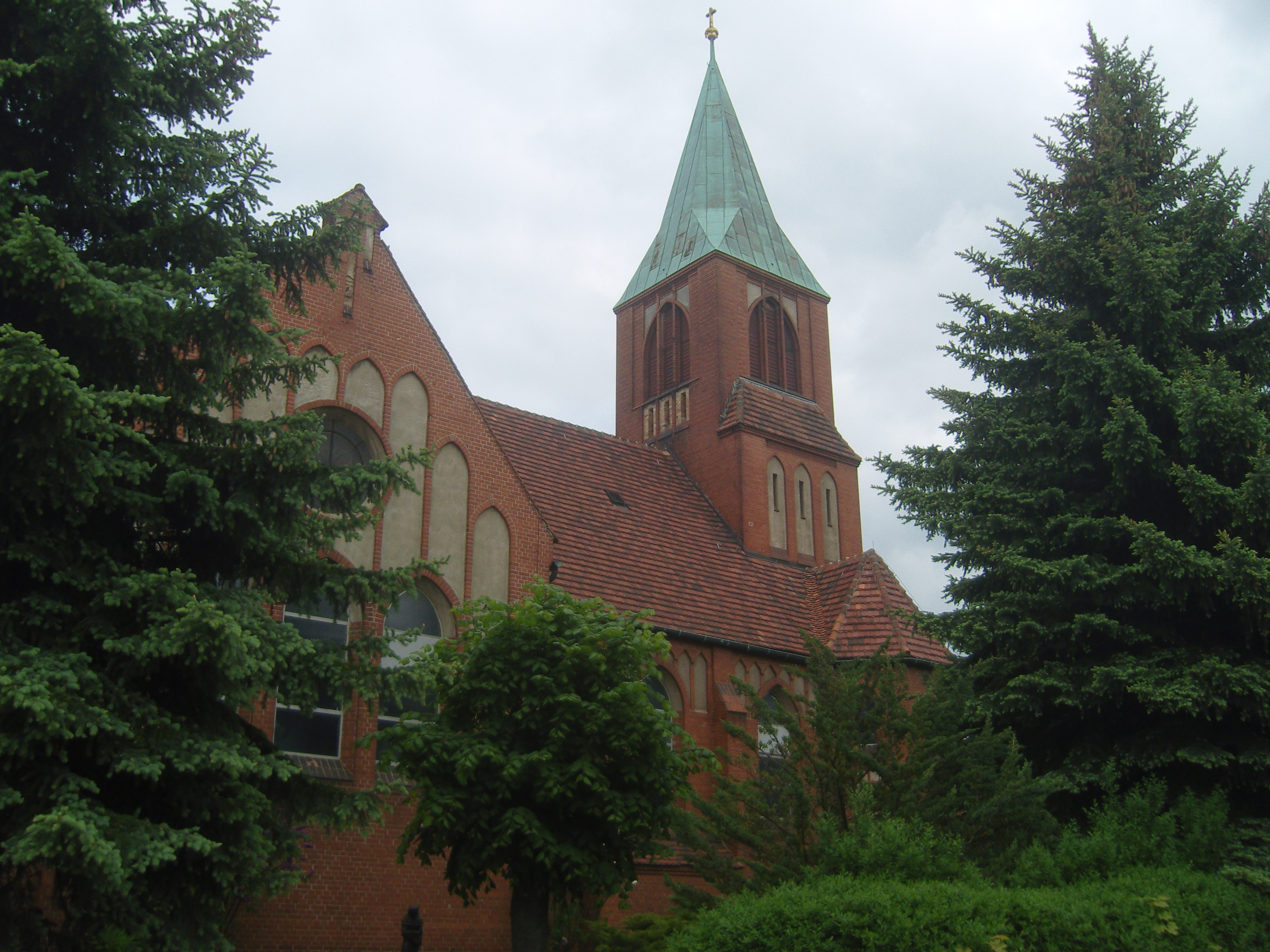 Katholische St. Antoniuskirche in Großräschen, Baudenkmal